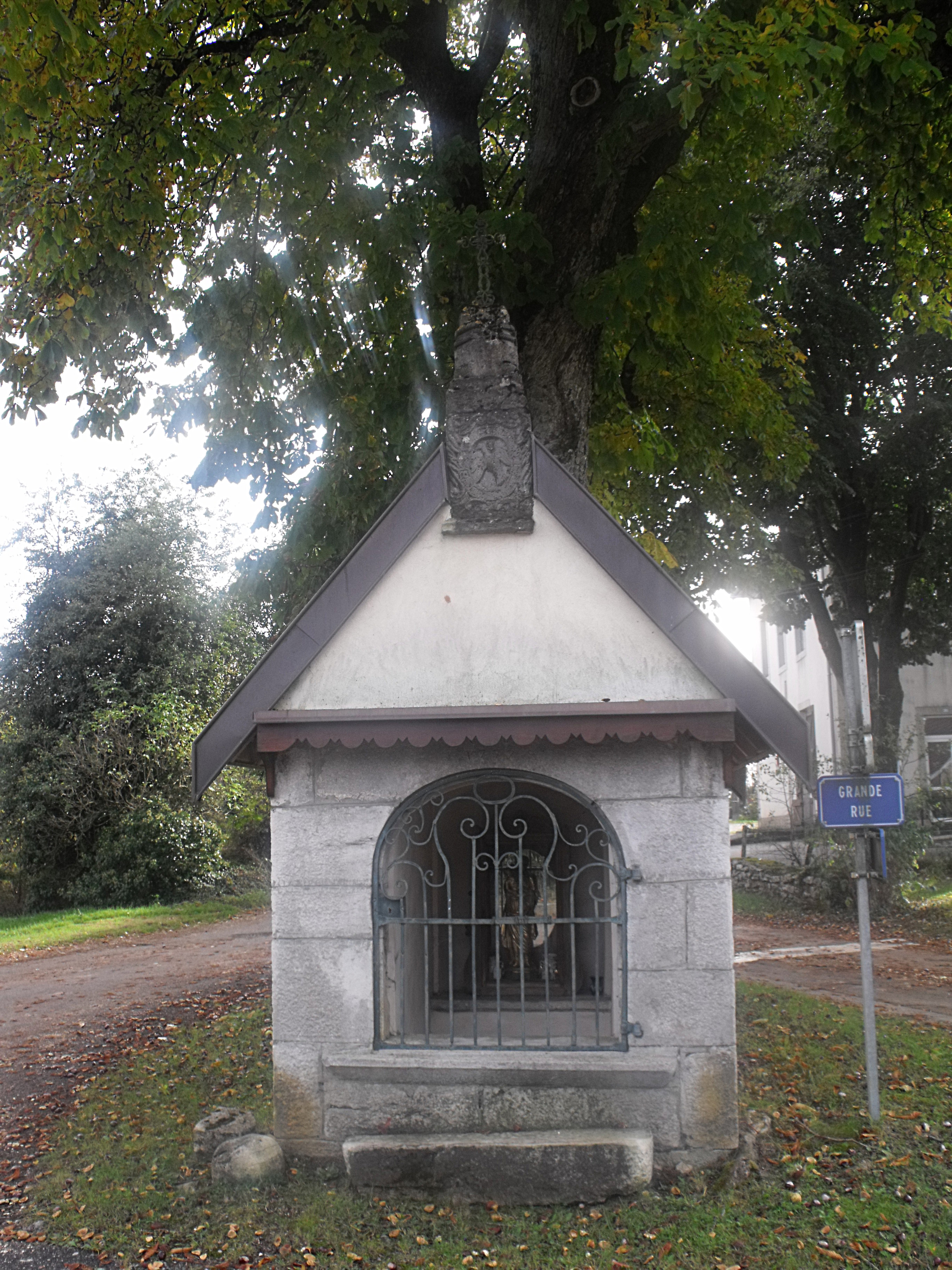 Chapelle à Vergranne, Doubs, France